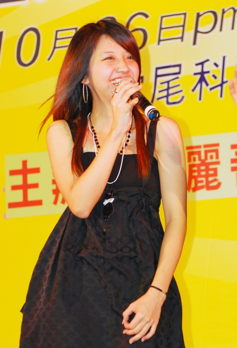 中文（台灣）: 李宣榕於雲林青春Young young行演唱會。